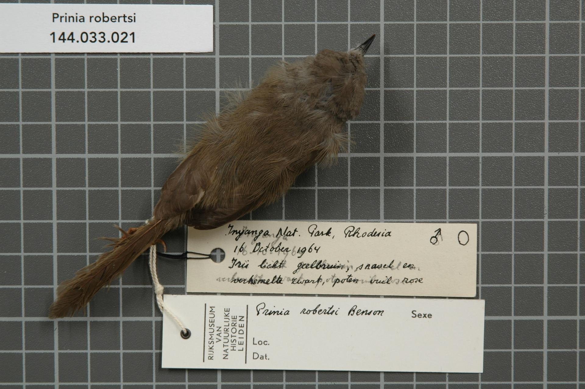 Prinia robertsi Benson, 1946